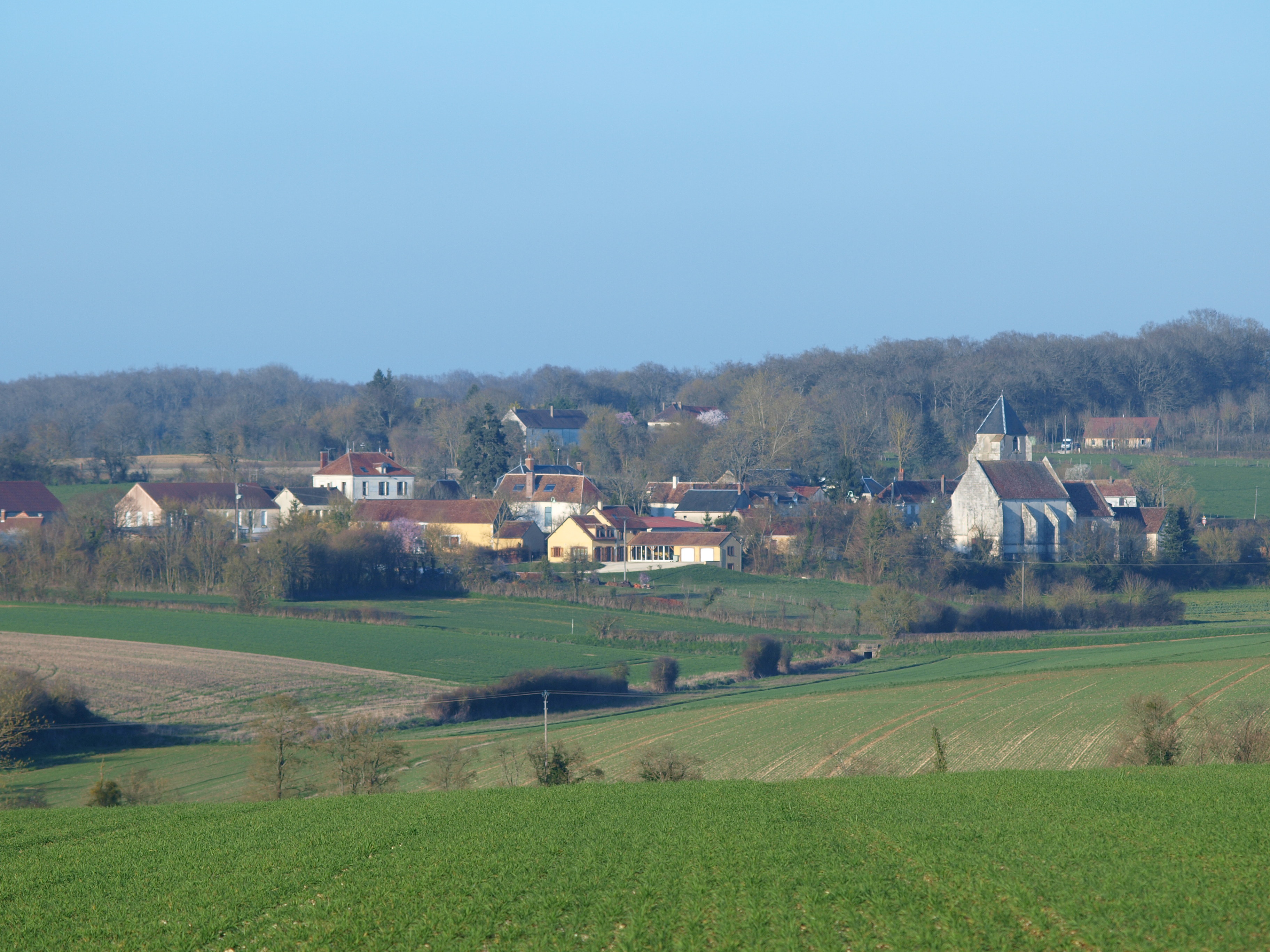 Levis (Yonne, France), panorama